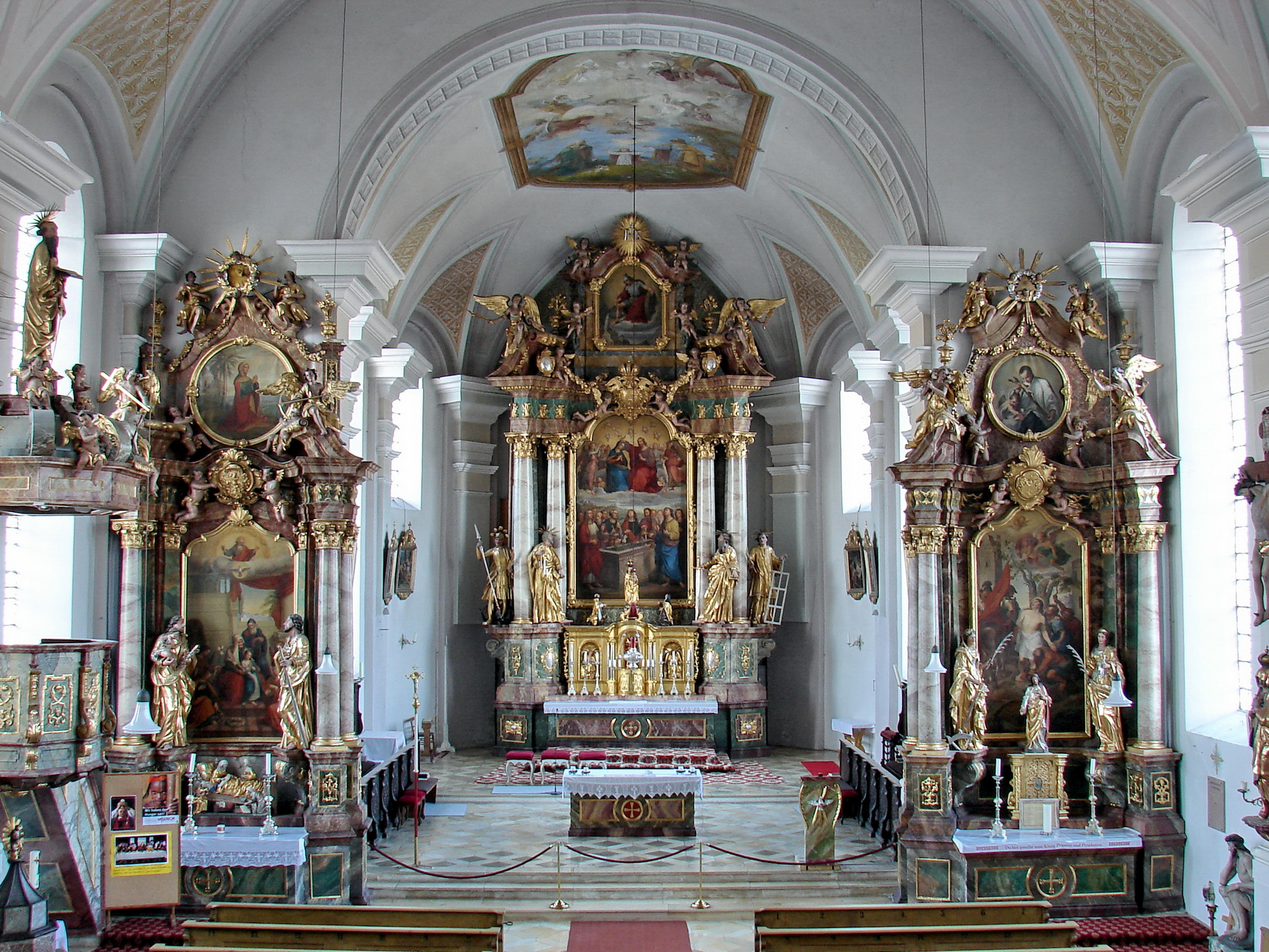 Die Kirche Mariä Geburt ist eine katholische Pfarrkirche im oberbayrischen Wartenberg.